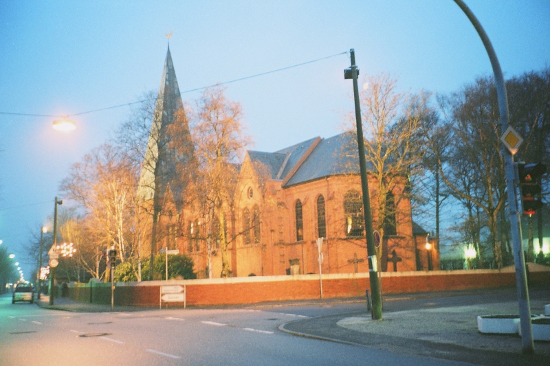 ev.-luth. St.-Gertrud-Kirche ("Döser Kirche") in Cuxhaven-Döse, Abendaufnahme